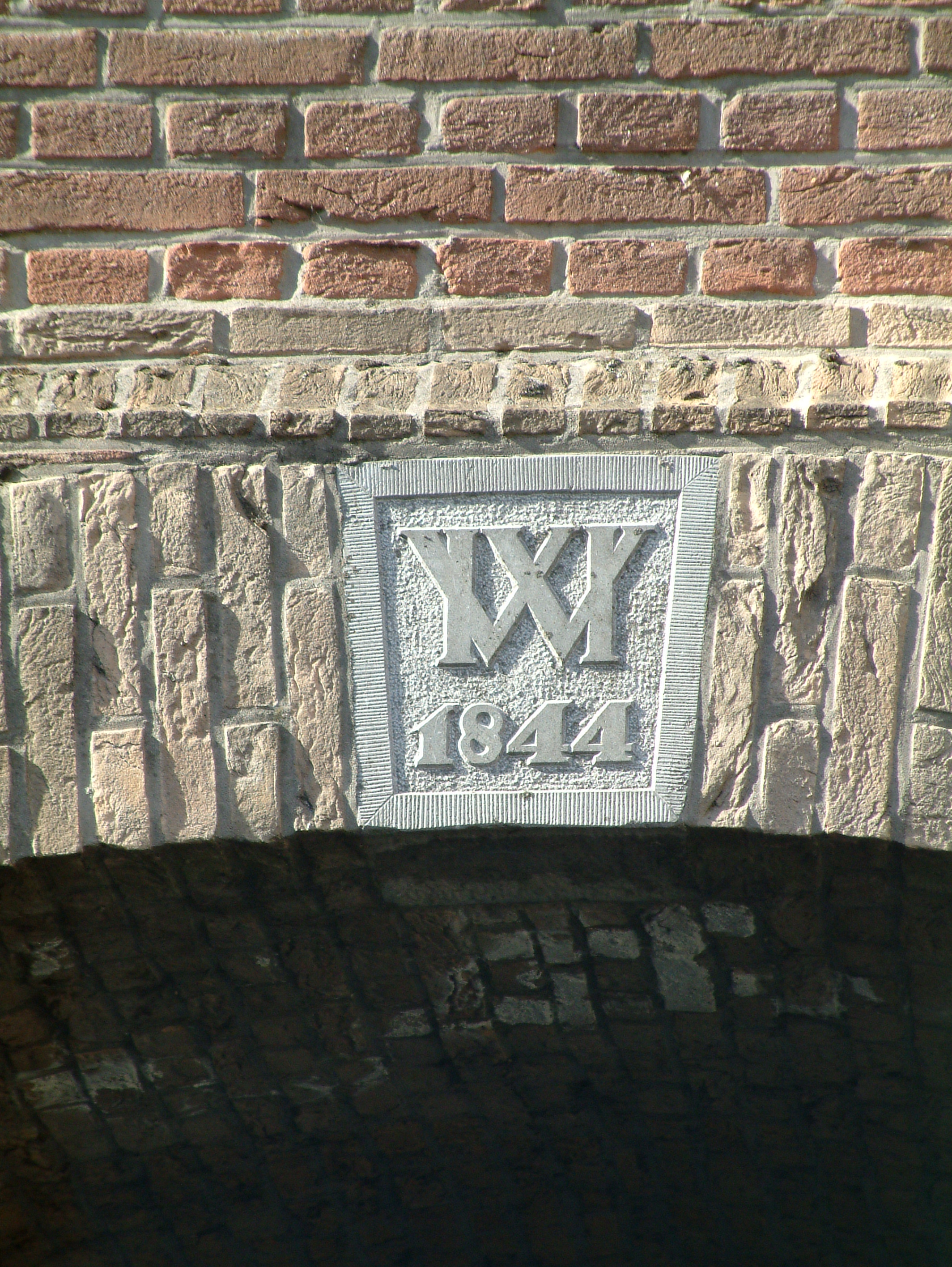 Brug in Den Haag